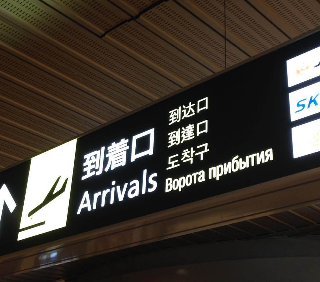 Надпись на русском языке в Новом аэропорте Титосэ